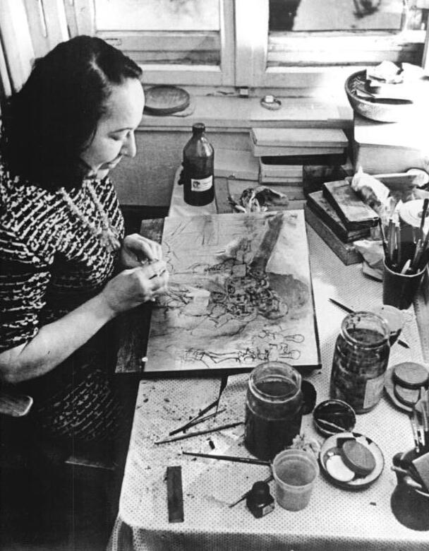 Die Grafikerin Prof. Lea Grundig an ihrem Arbeitsplatz. Aus: Mit dem Sozialismus gewachsen Verlag die Wirtschaft, Berlin-Ost Gesamtdeutsches Institut Bundesanstalt für Gesamtdeutsche Aufgaben unverkäuflich